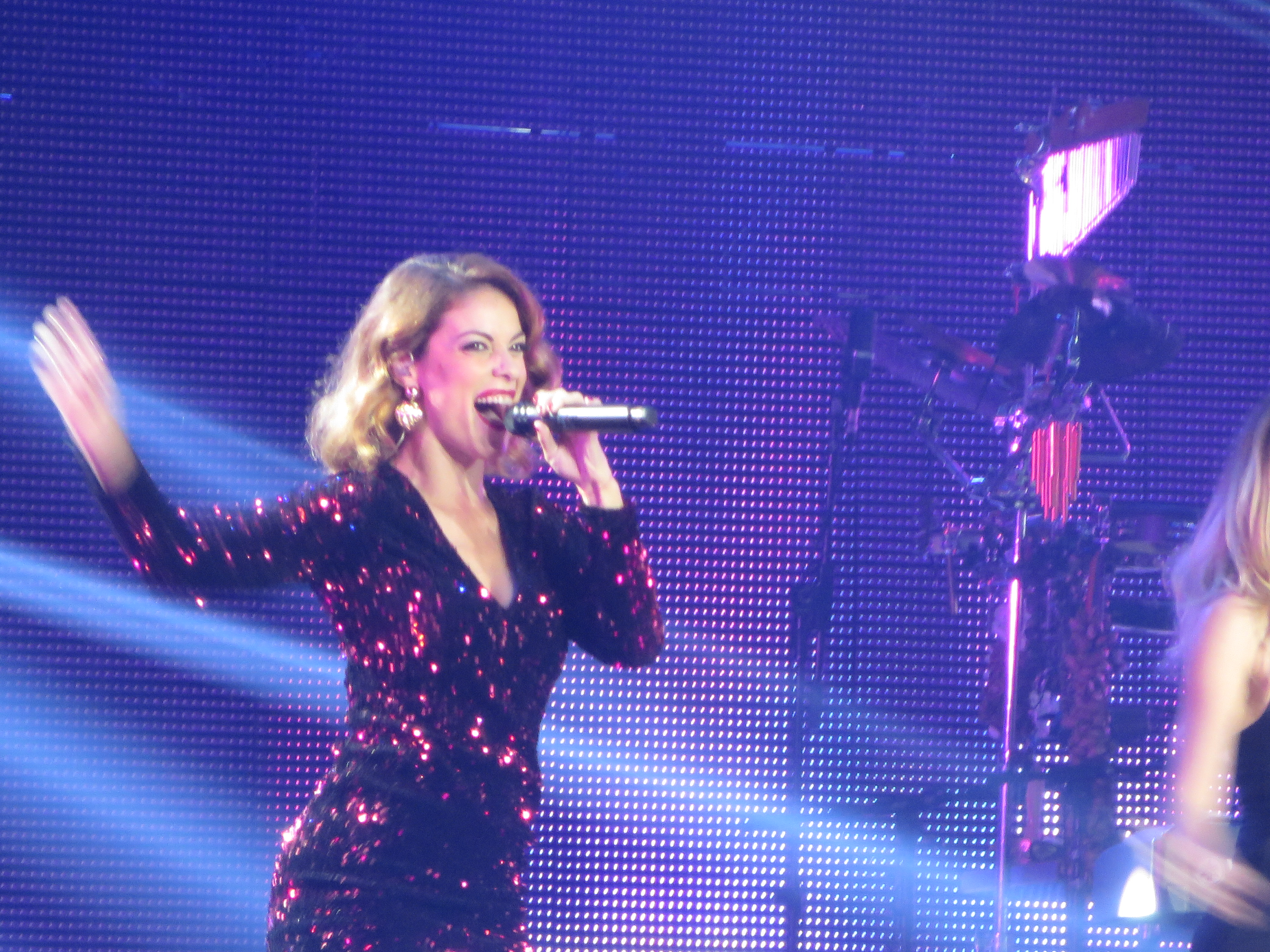 Actuación de Geno en el concierto conmemorativo del 15 aniversario de OT en el Palau Sant Jordi de Barcelona (31-10-2016)